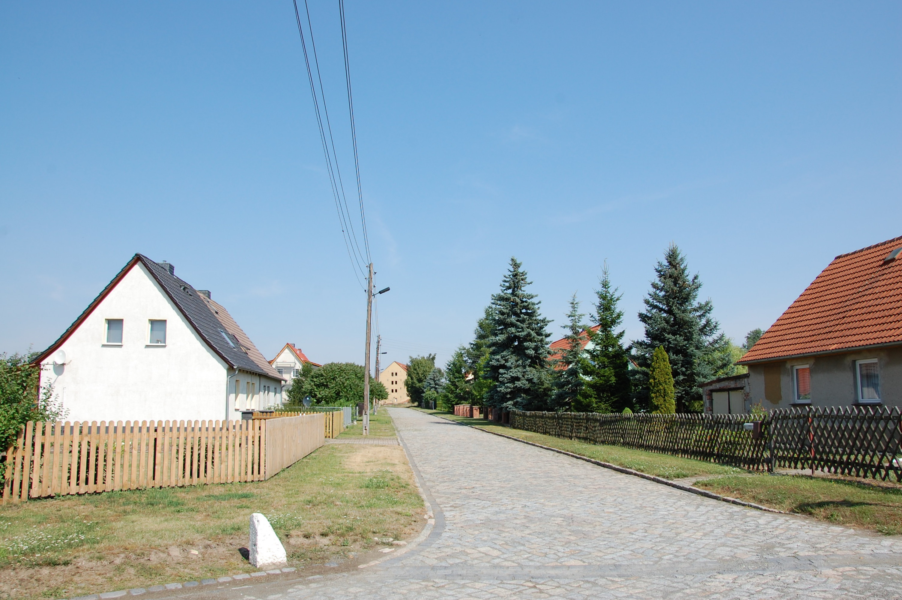 Häuser in Münchenhof